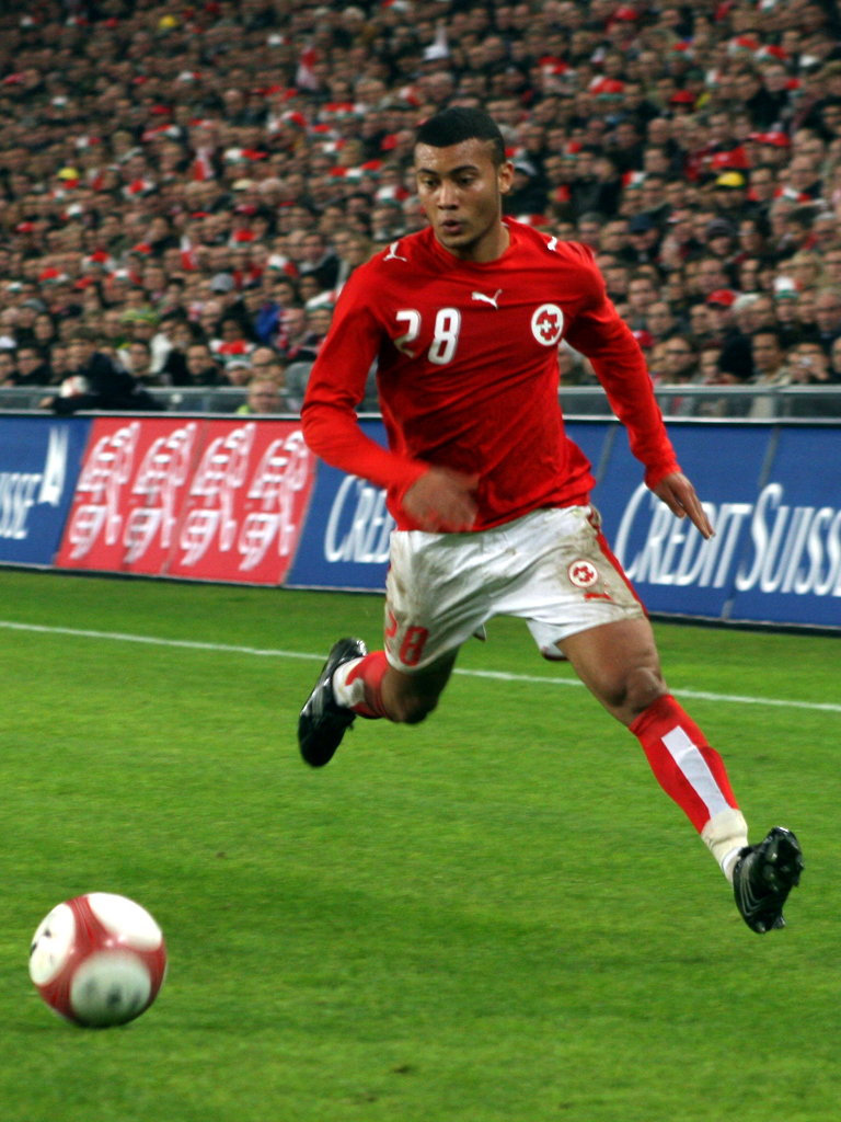 Johan Vonlanthen, St. Jakob Stadion, Basel (Switzerland), Switzerland - Brasil 1:2